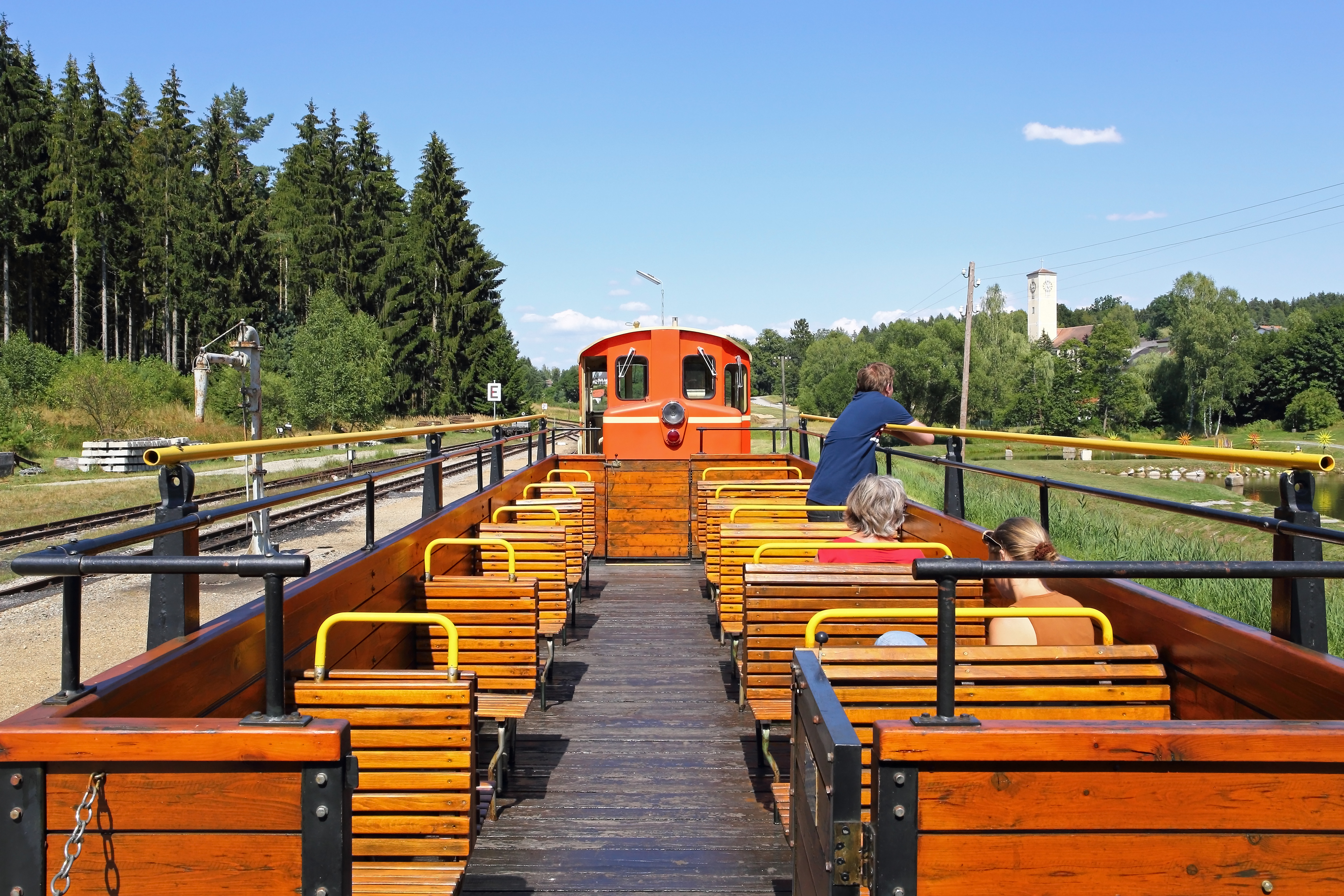 Durch Umbau eines Güterwagens aus dem Jahr 1906 entstand 2006 der Aussichtswagen des Waldviertler Schmalspurbahnvereines.